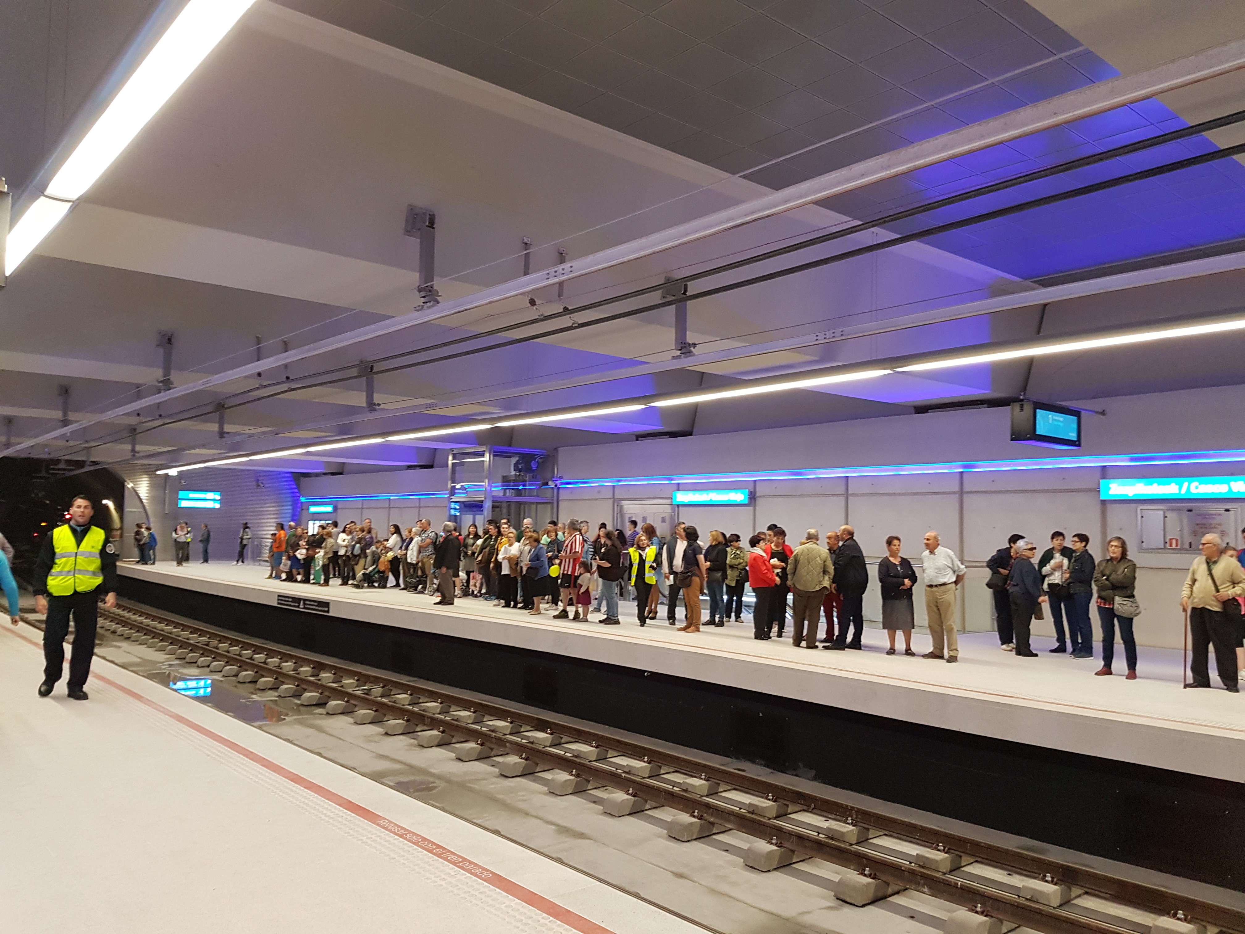 Estación de Zazpikaleak/Casco Viejo.